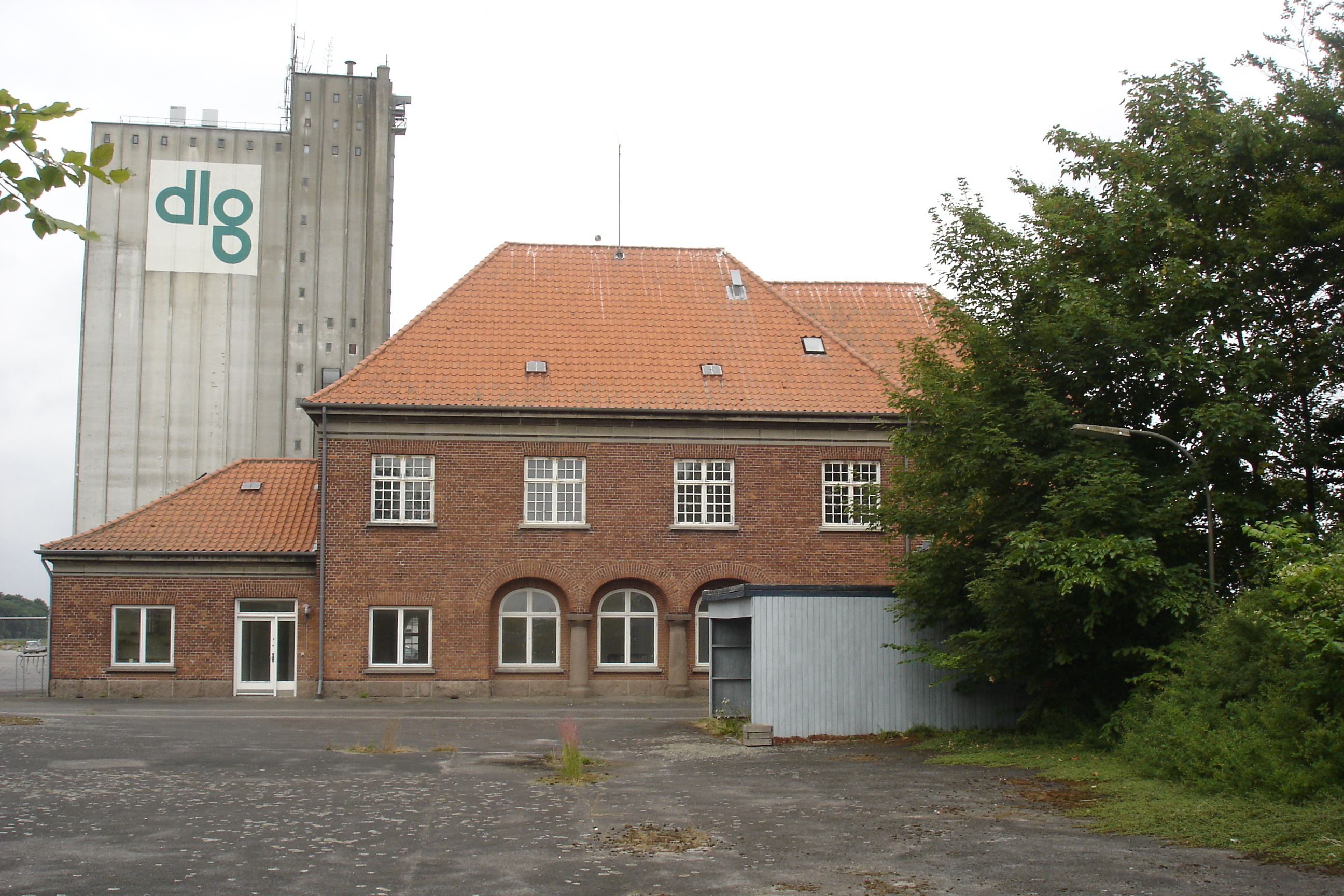 Stubbekøbing Station fra sporsiden